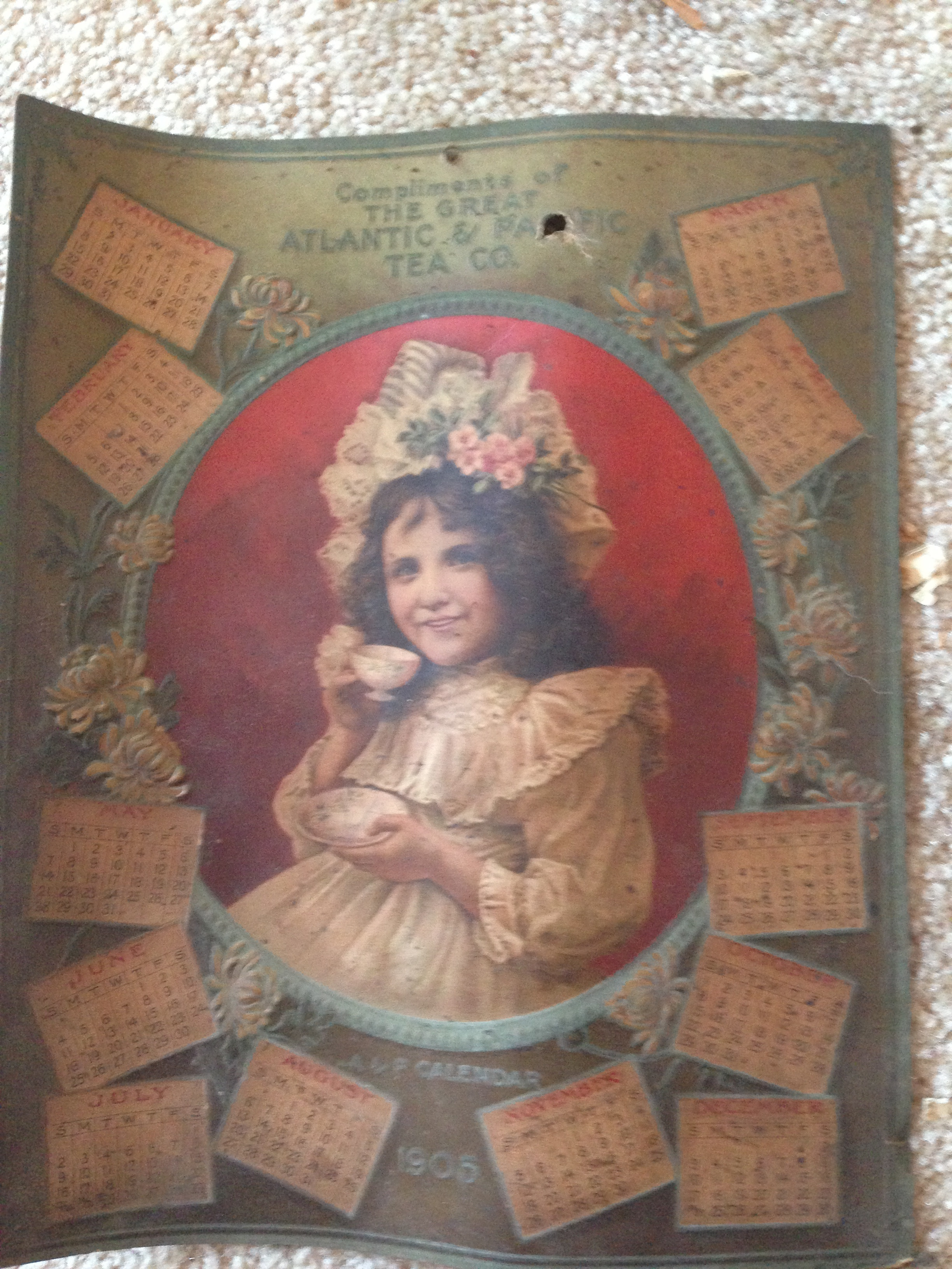 Es un almanque original de esta compania del año 1905